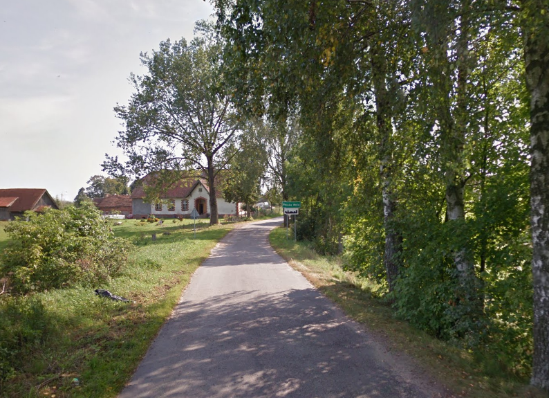 Pańska Wola wjazd do wsi